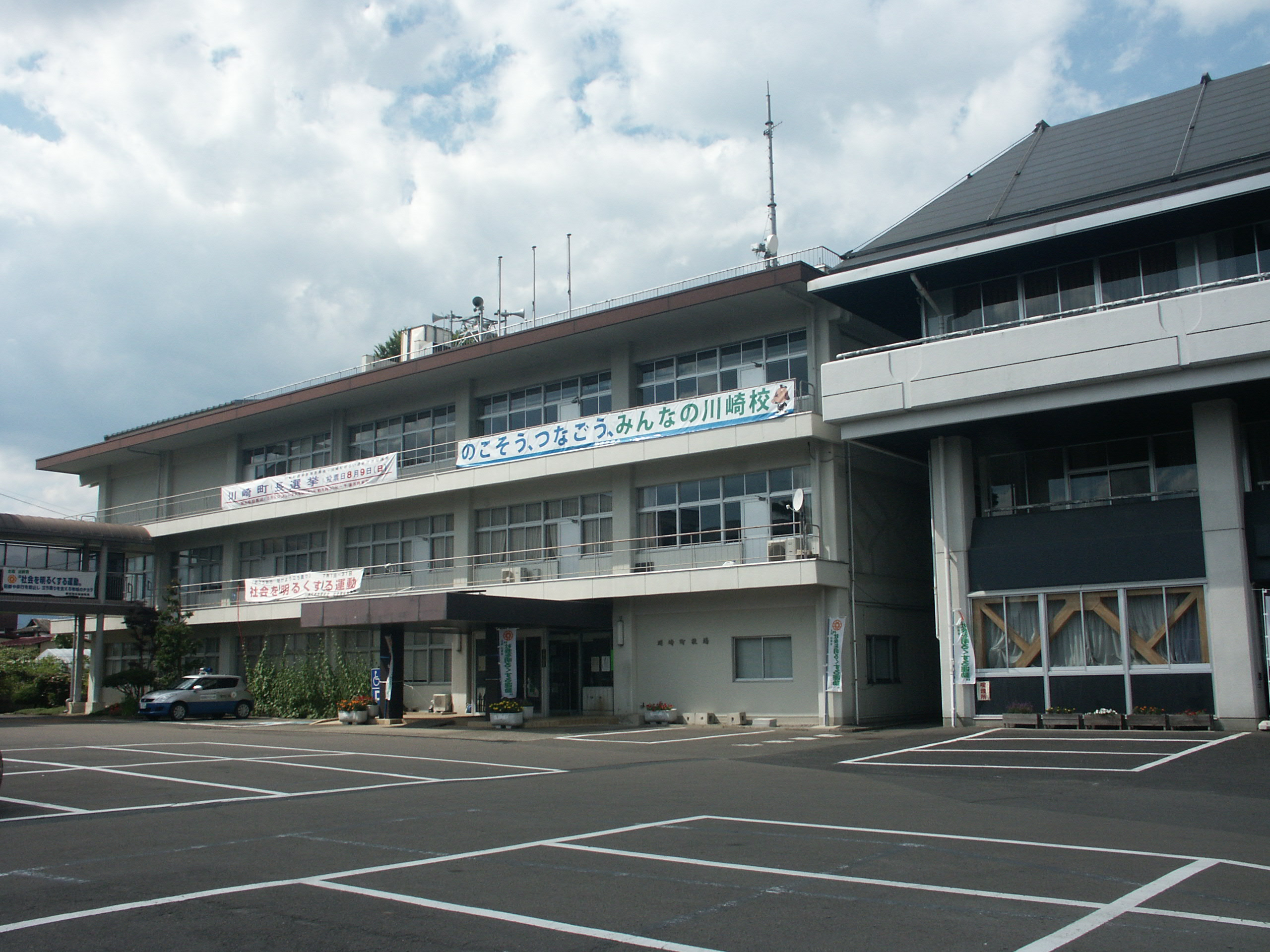 川崎町役場庁舎